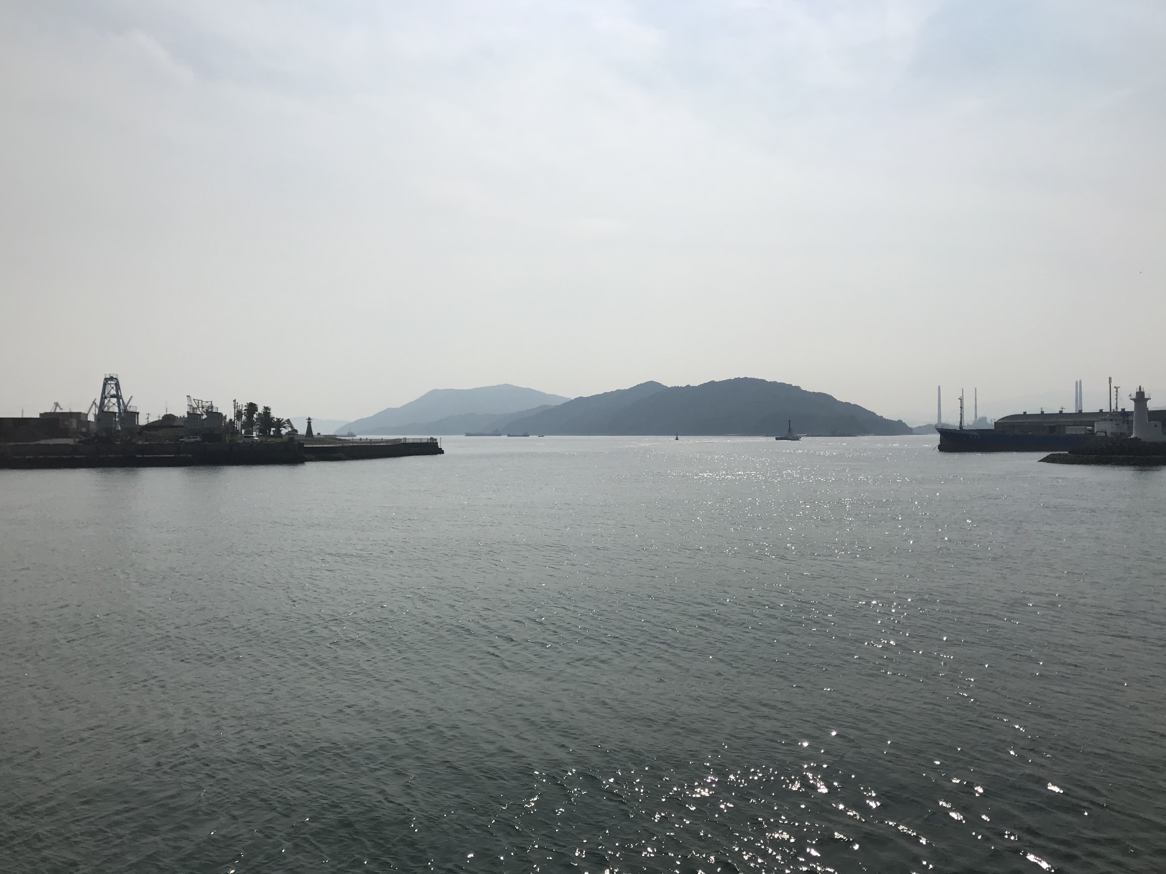 徳山港より望む仙島と黒髪島